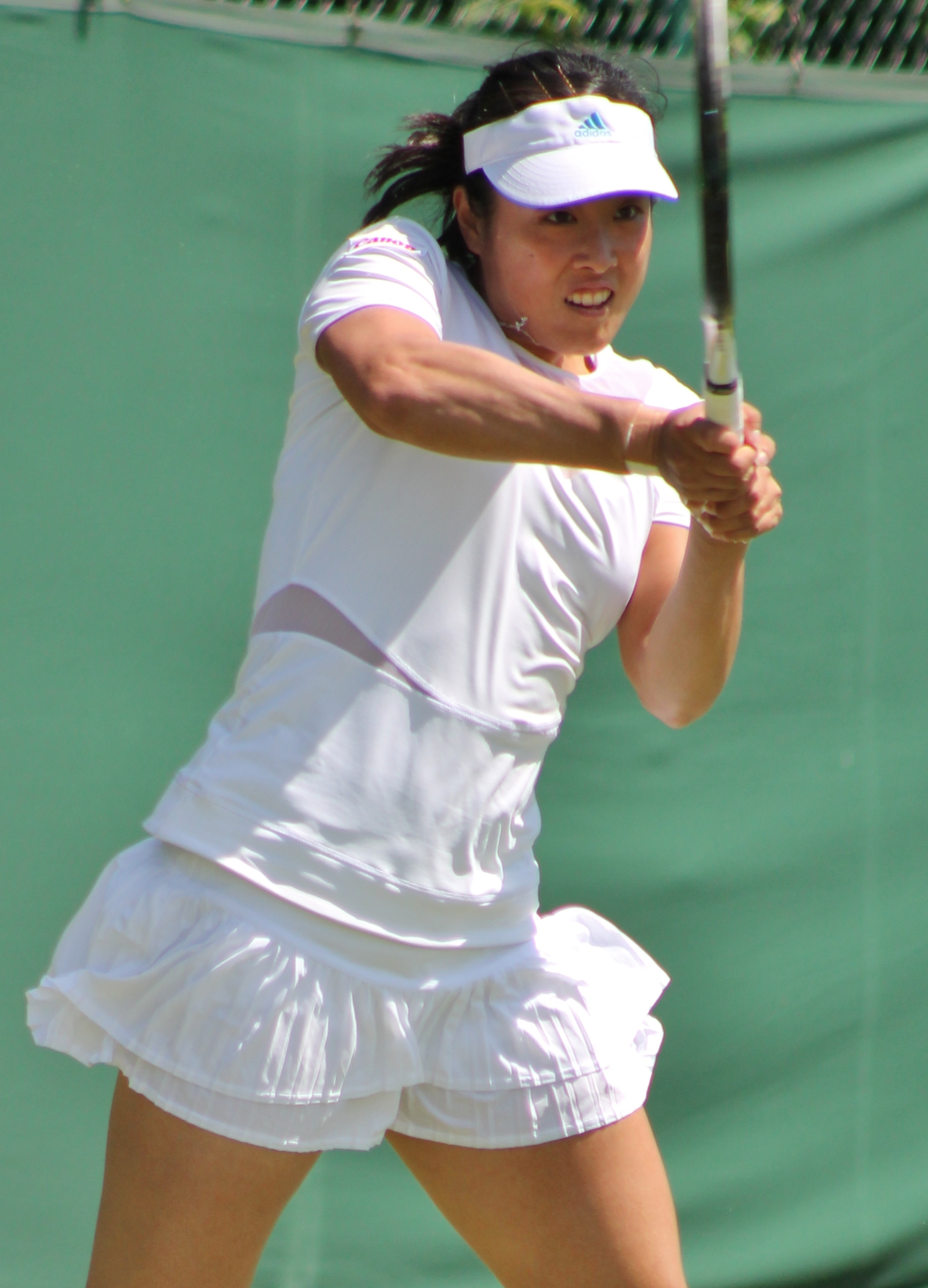 Morita WMQ14 (7)